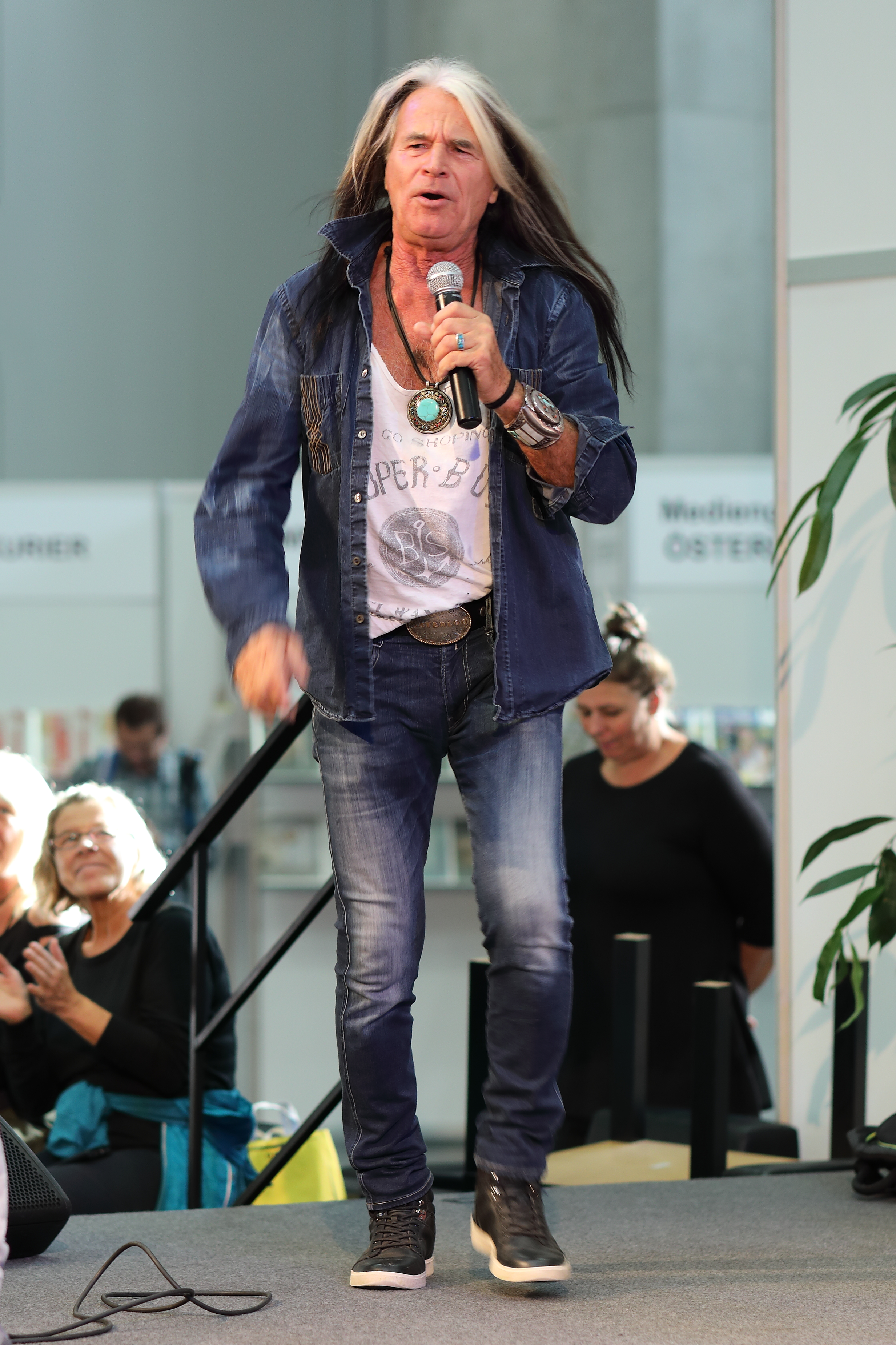 Der österreichische Popmusiker Waterloo bei seinem Auftritt bei der Seniorenmesse „Lebenslust“ in Wien (Herbst 2018).